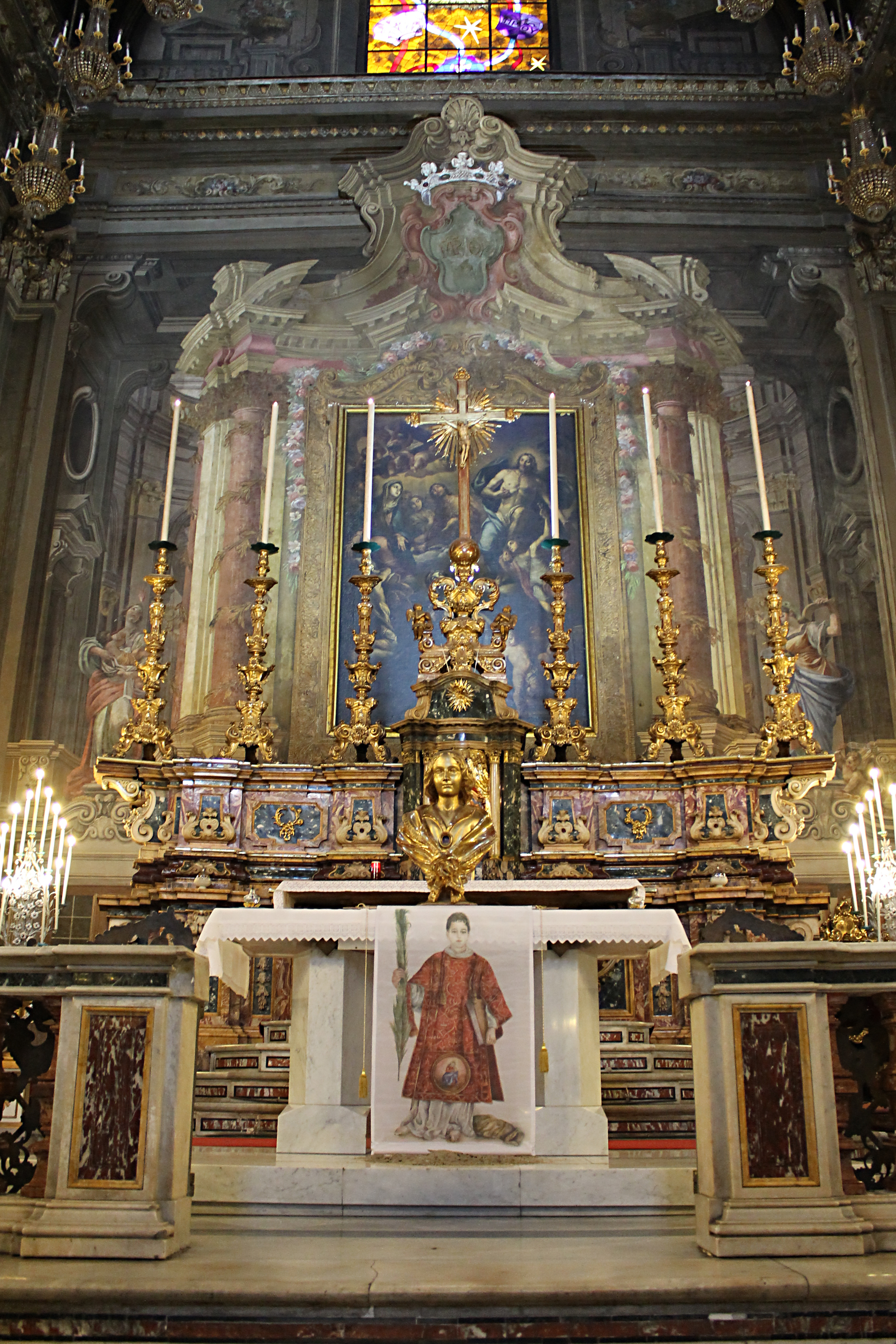 Altare maggiore Chiesa Santa Brigida, Napoli; esposizione della nuova icona di San Cesario diacono e martire e del suo busto ligneo.